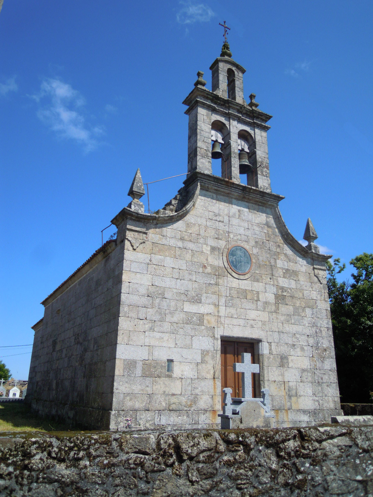 Igrexa parroquial de Merlán (Chantada)